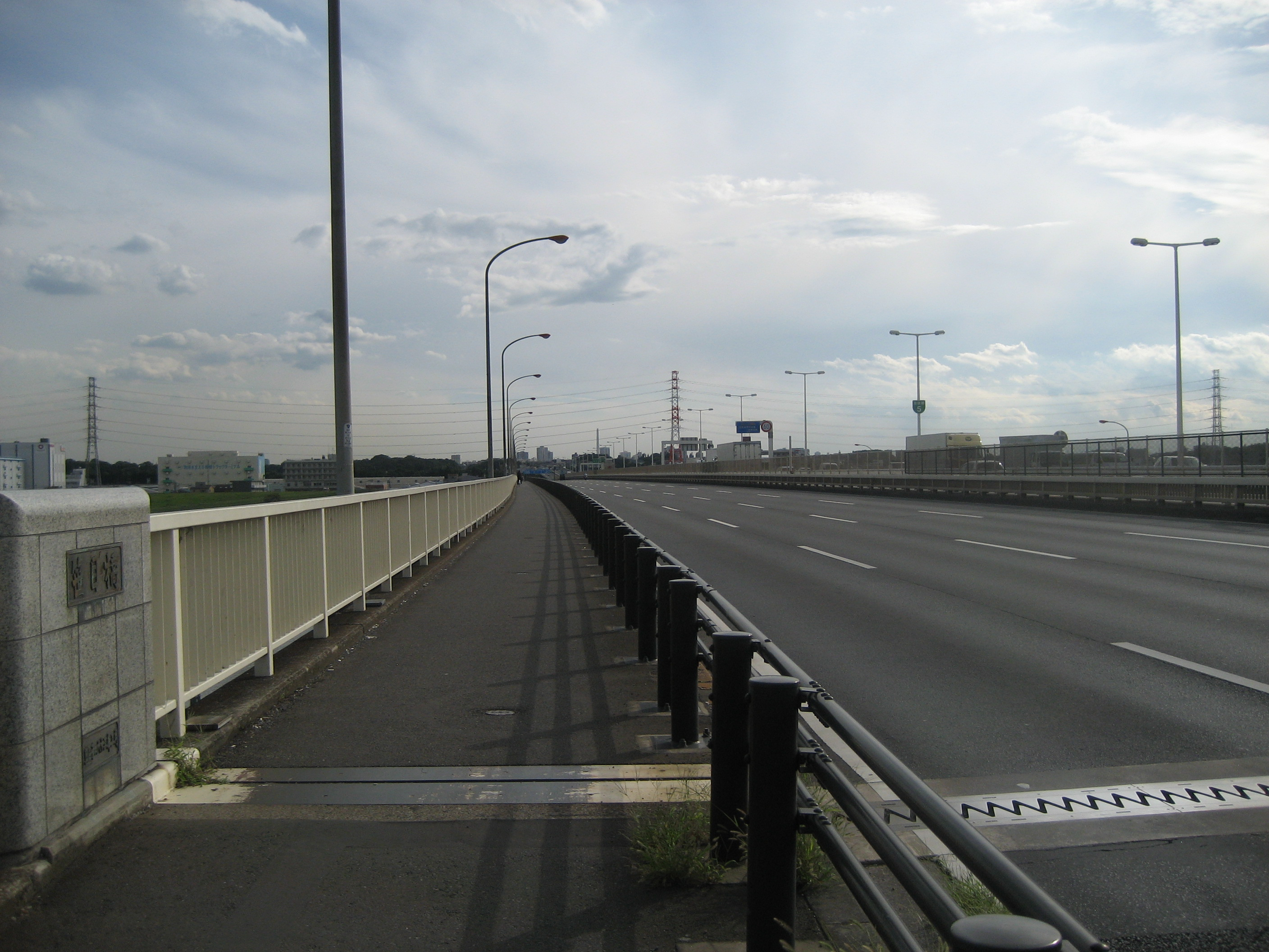 笹目橋（戸田市側から撮影）